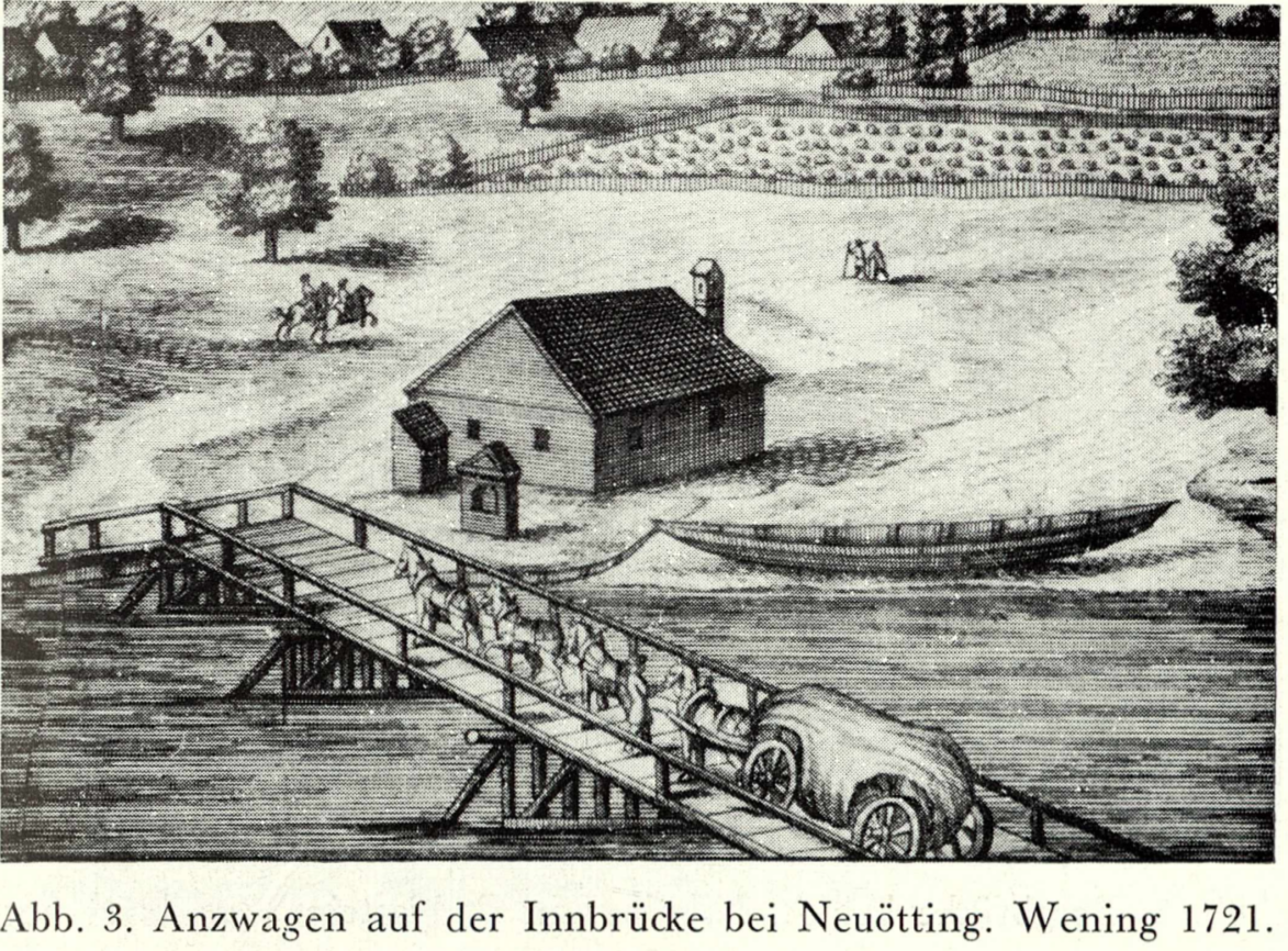 Vierspänniger Anzwagen bei Überquerung der Innbrücke bei Neuötting, Wening 1721.